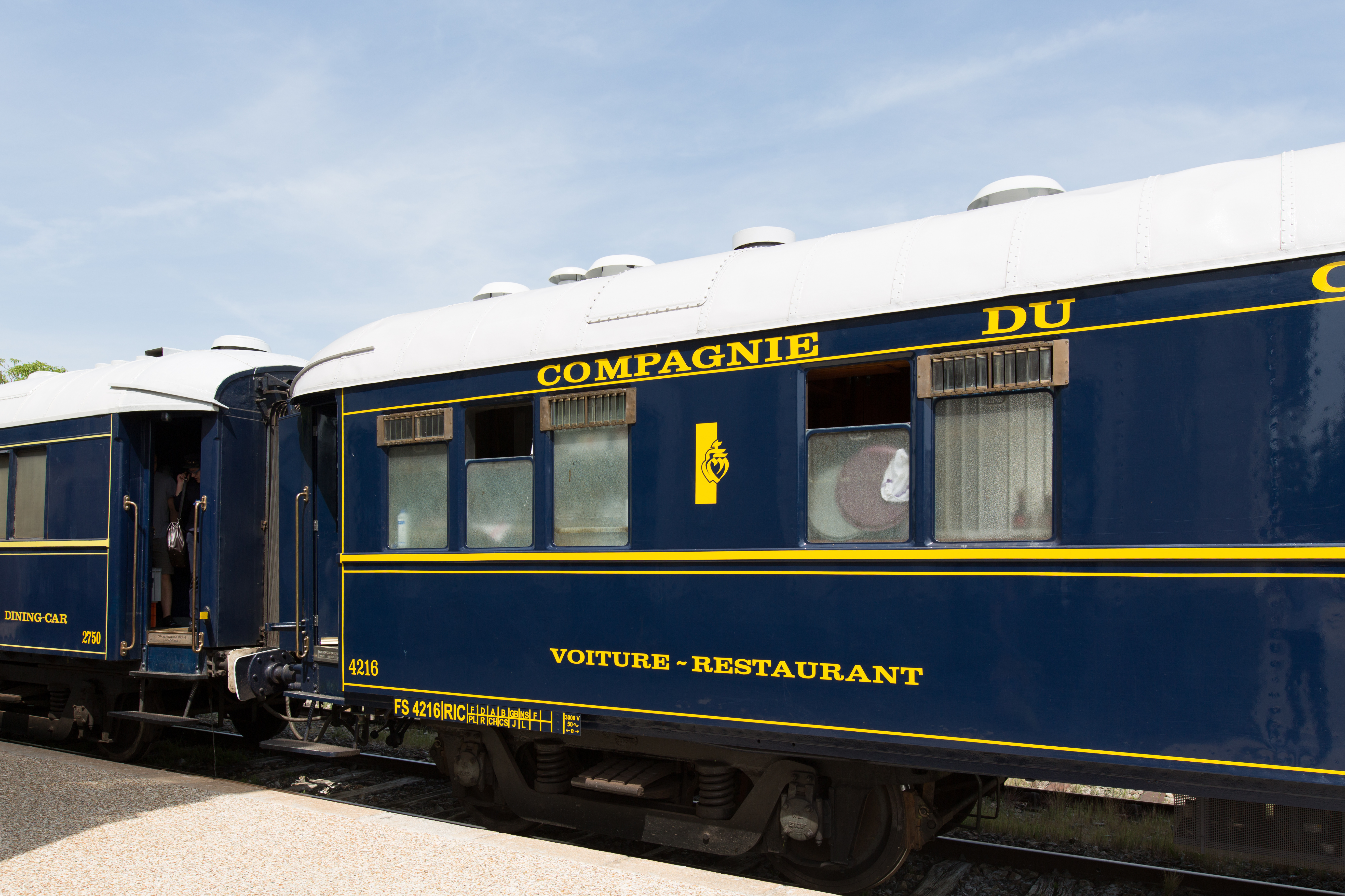 CIWL 4216 - Côté cuisines